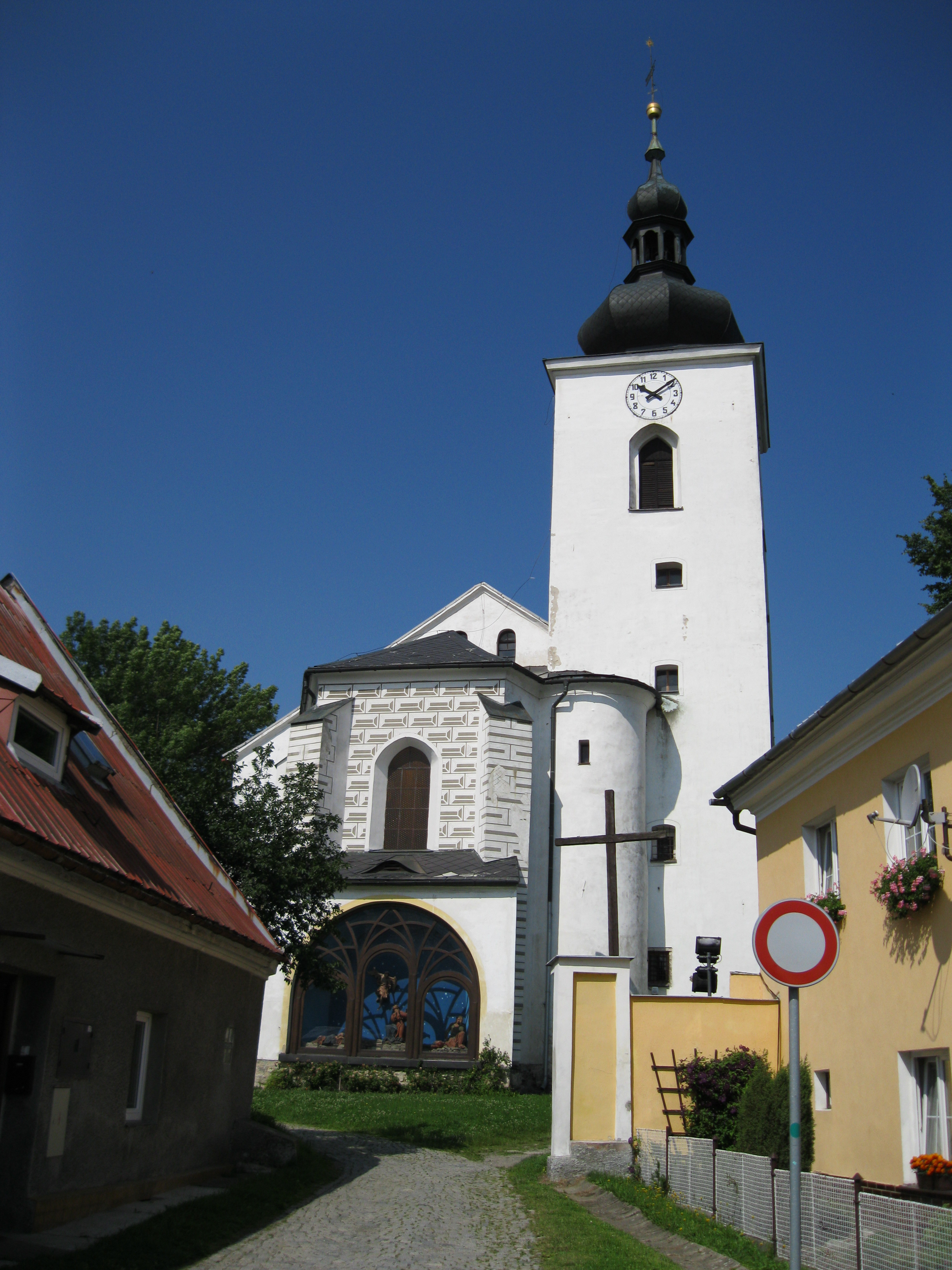 Kostel Nanebevzetí Panny Marie (Moravský Beroun), Moravský Beroun